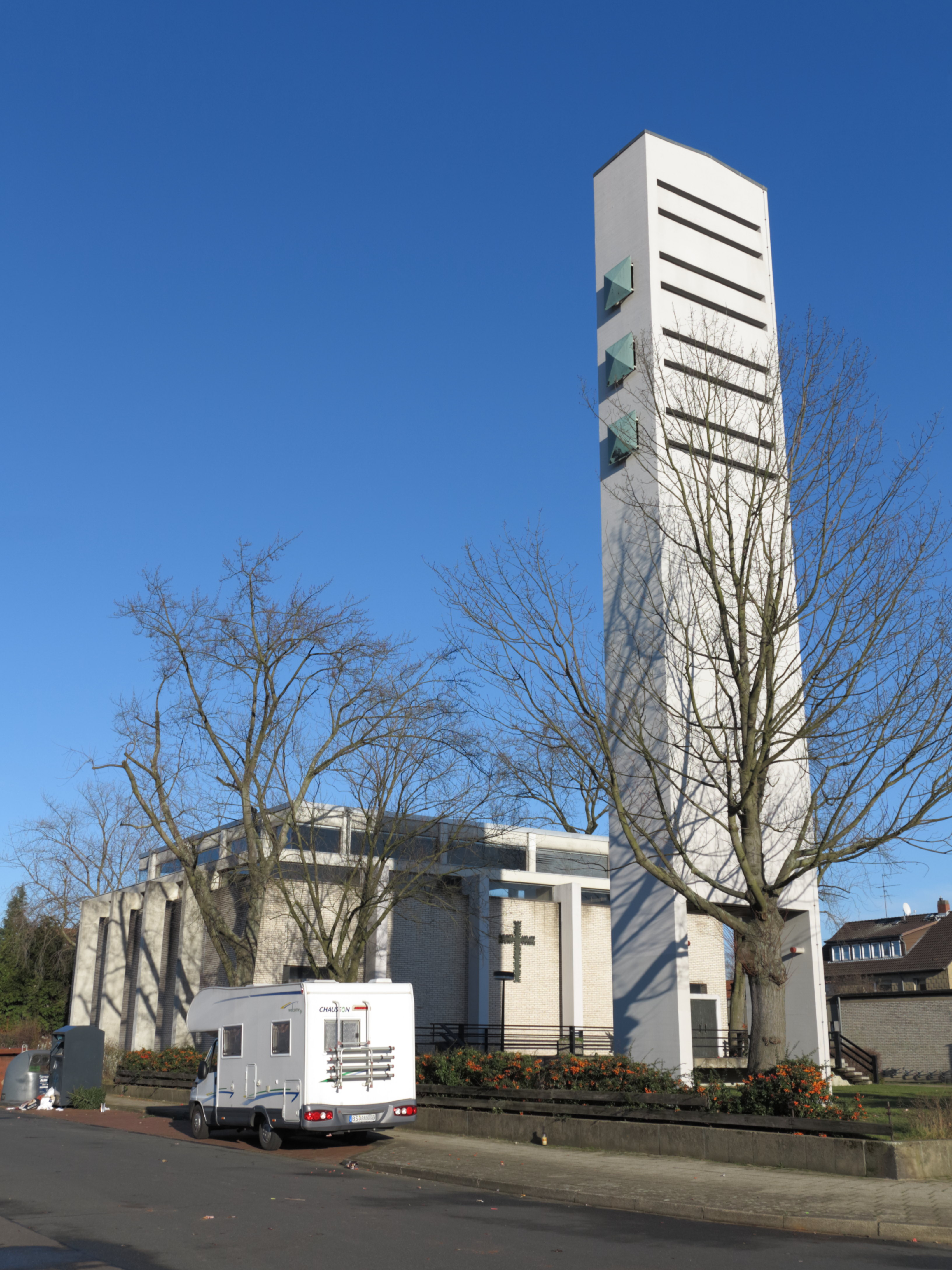 Evangelisch-lutherische St. Lukas Kirche in Braunschweig Querum. Das Gebäude wurde 1962 eingeweiht.